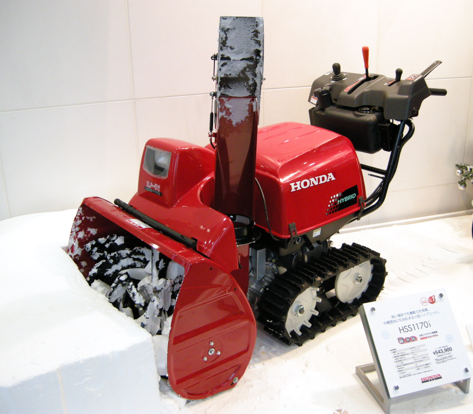 Honda HSS1170i Hybrid Snow blower.